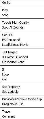 Srpski (latinica): Slika ActionScripta